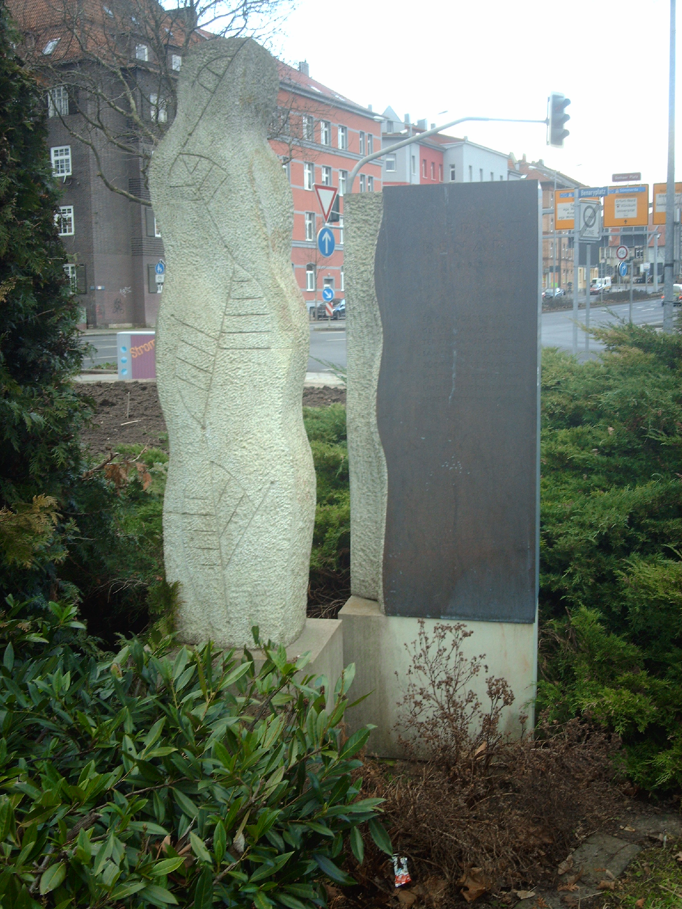 Benary-Denkmal am Benaryplatz in Erfurt.